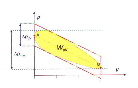 eigene Skizze PV-Diagramm realer Prozess.